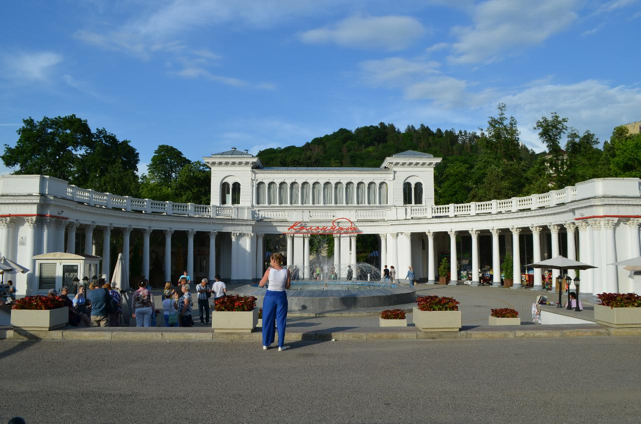 Колоннада Кисловодск